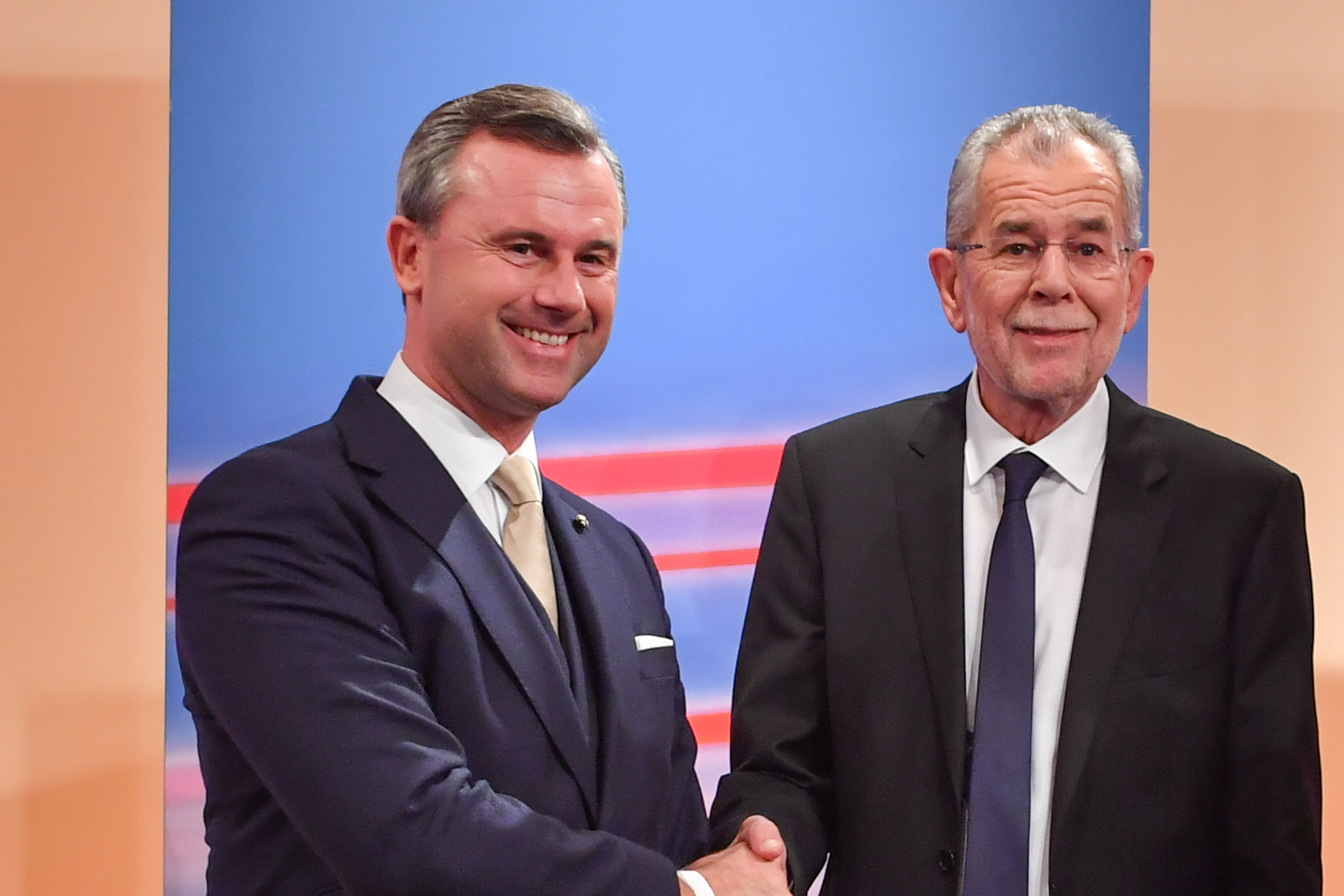 Wahl zum österreichischen Bundespräsidenten am 4. Dezember 2016. Bild zeigt Norbert Hofer und Alexander Van der Bellen nach der Wahl im ORF-Studio in der Hofburg.